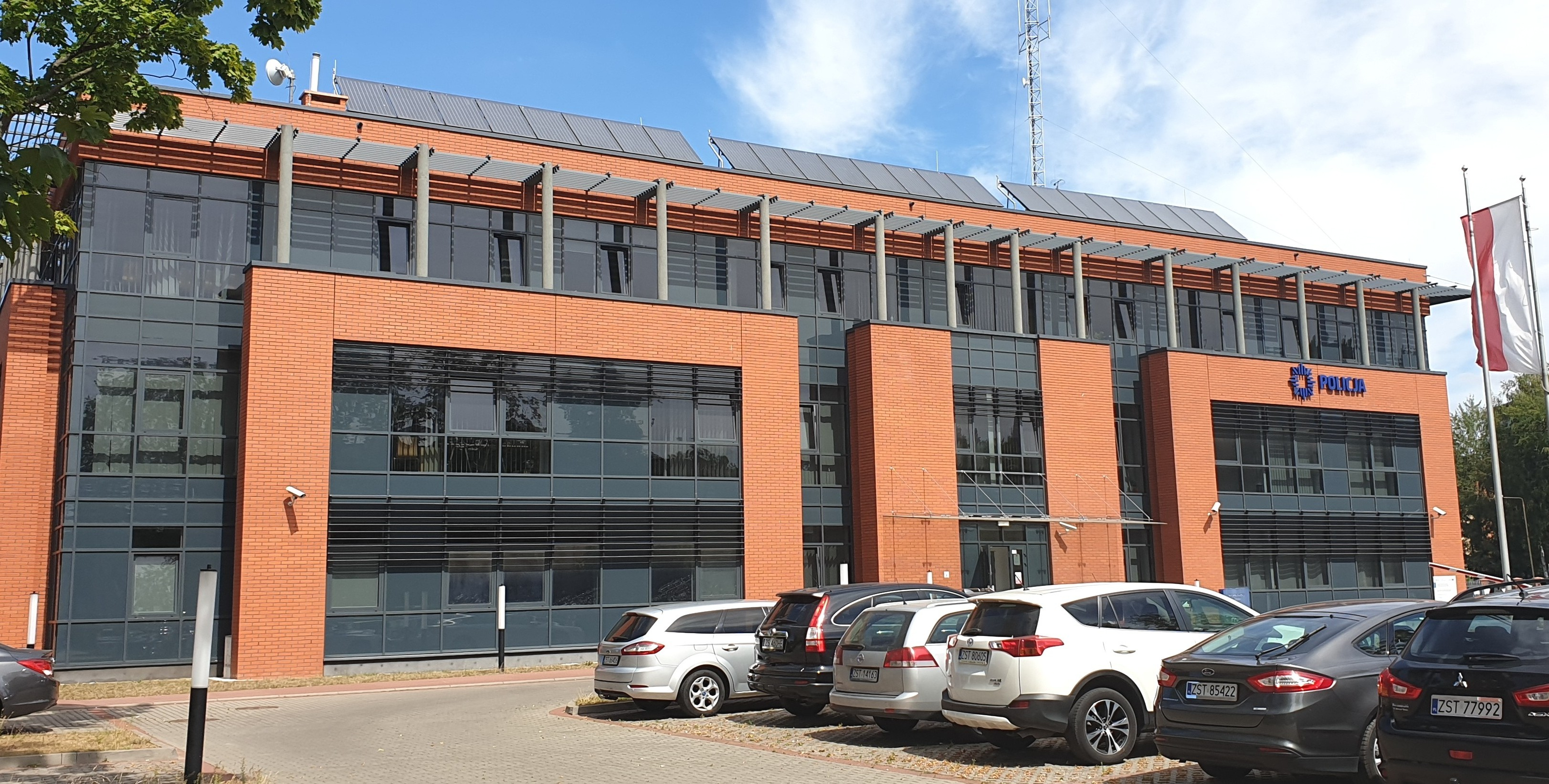 Komenda Policji w Stargardzie